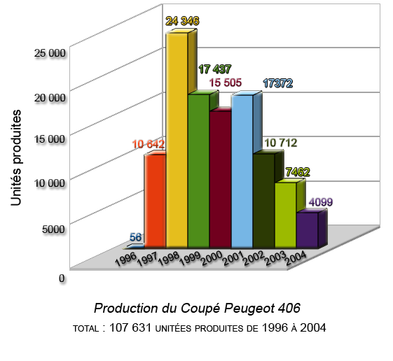 Tableau de production du Peugeot 406 coupé, des pré-séries à l'arrêt de fabrication.